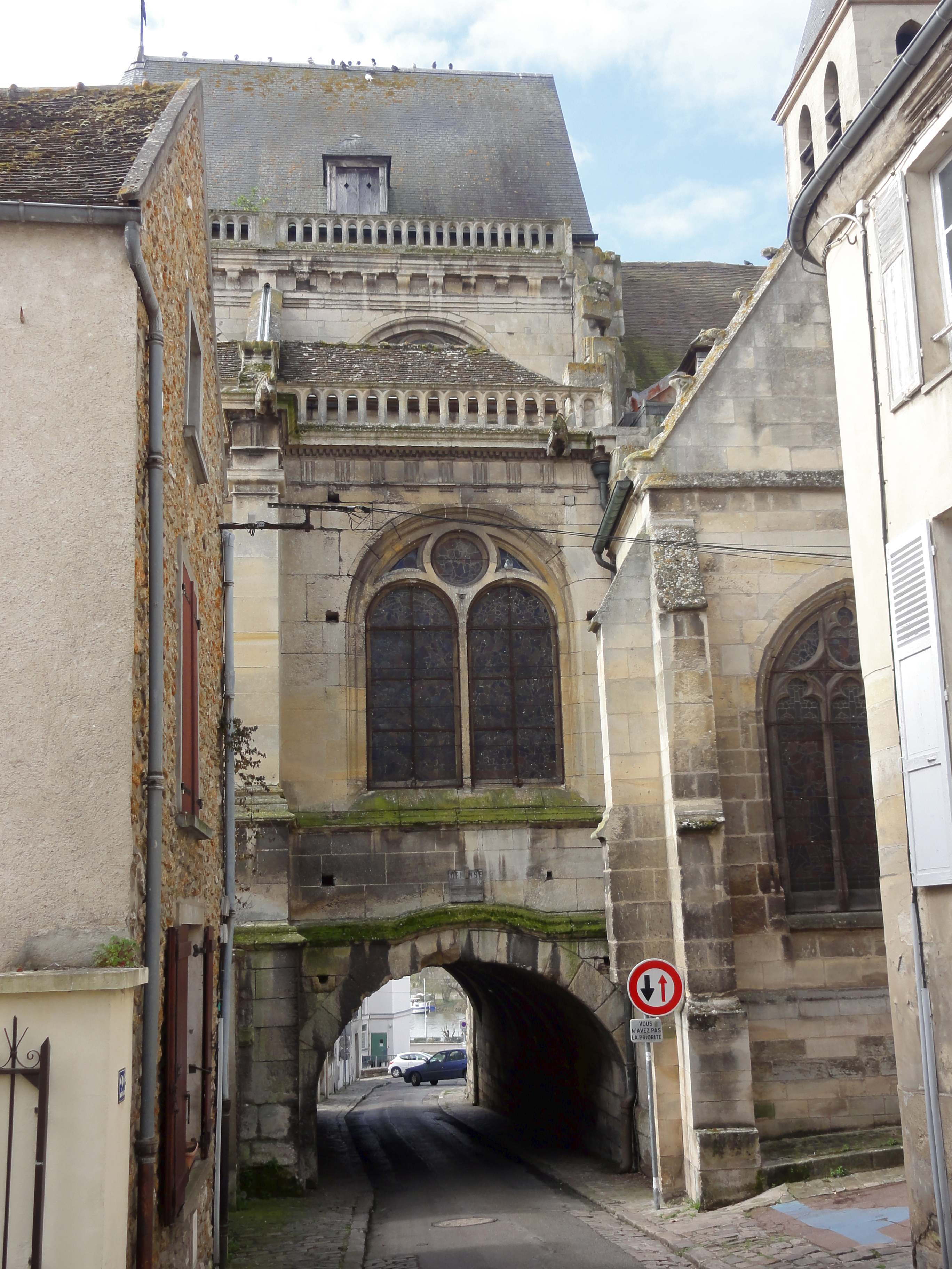 Église Saint-Martin - voir titre.